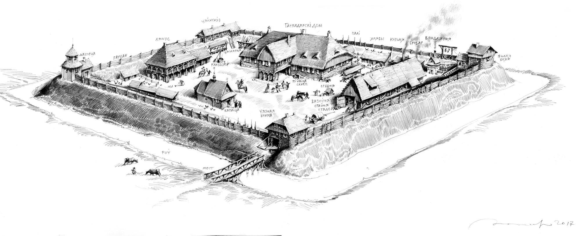 Умацаваны Гаспадарскі двор (двор старасты Радуньскага староства, вялікакняская маёмасць) ў Радуні (сяр. 17-га ст.)